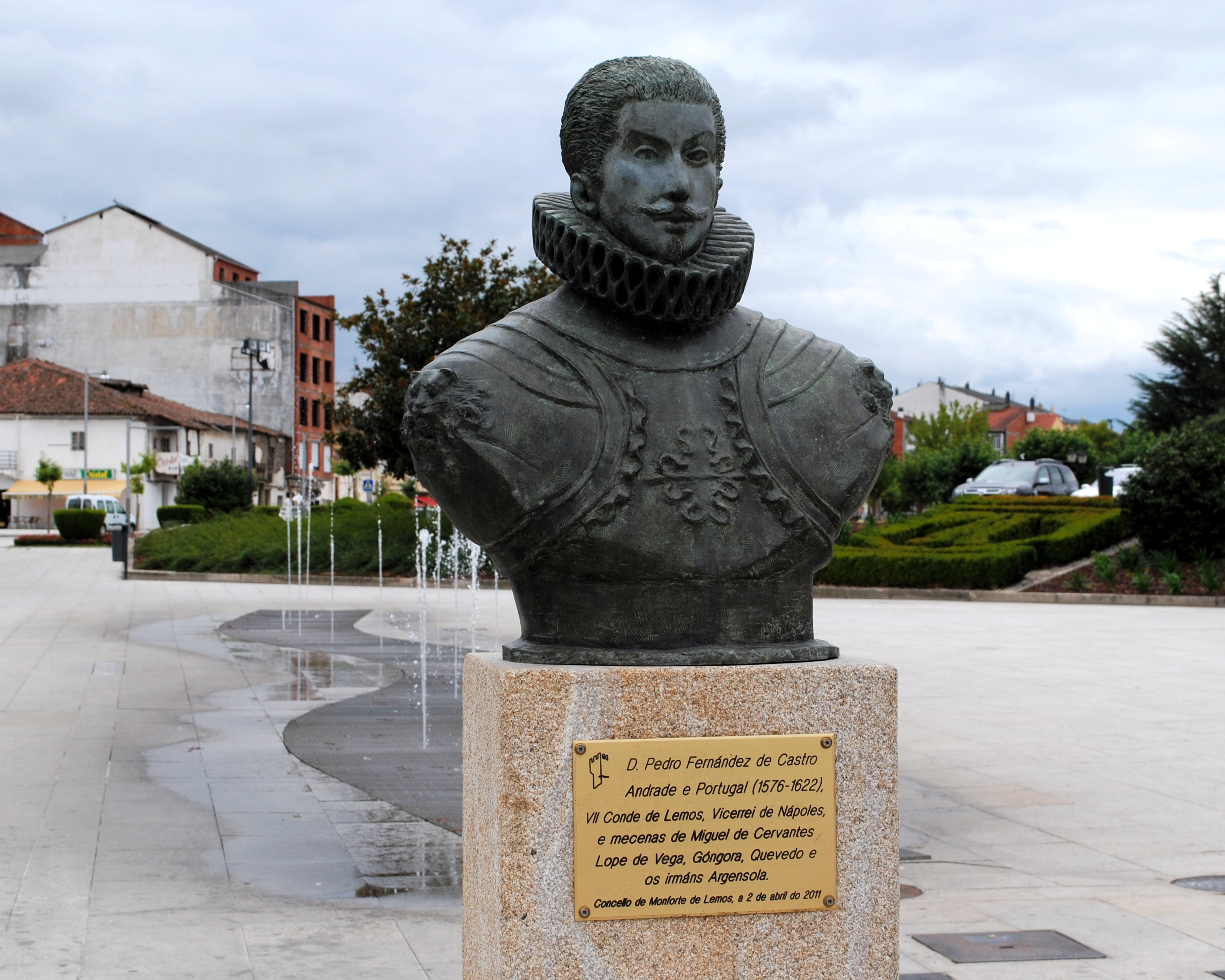 Pedro Fernández de Castro Andrade e Portugal, Monforte de Lemos